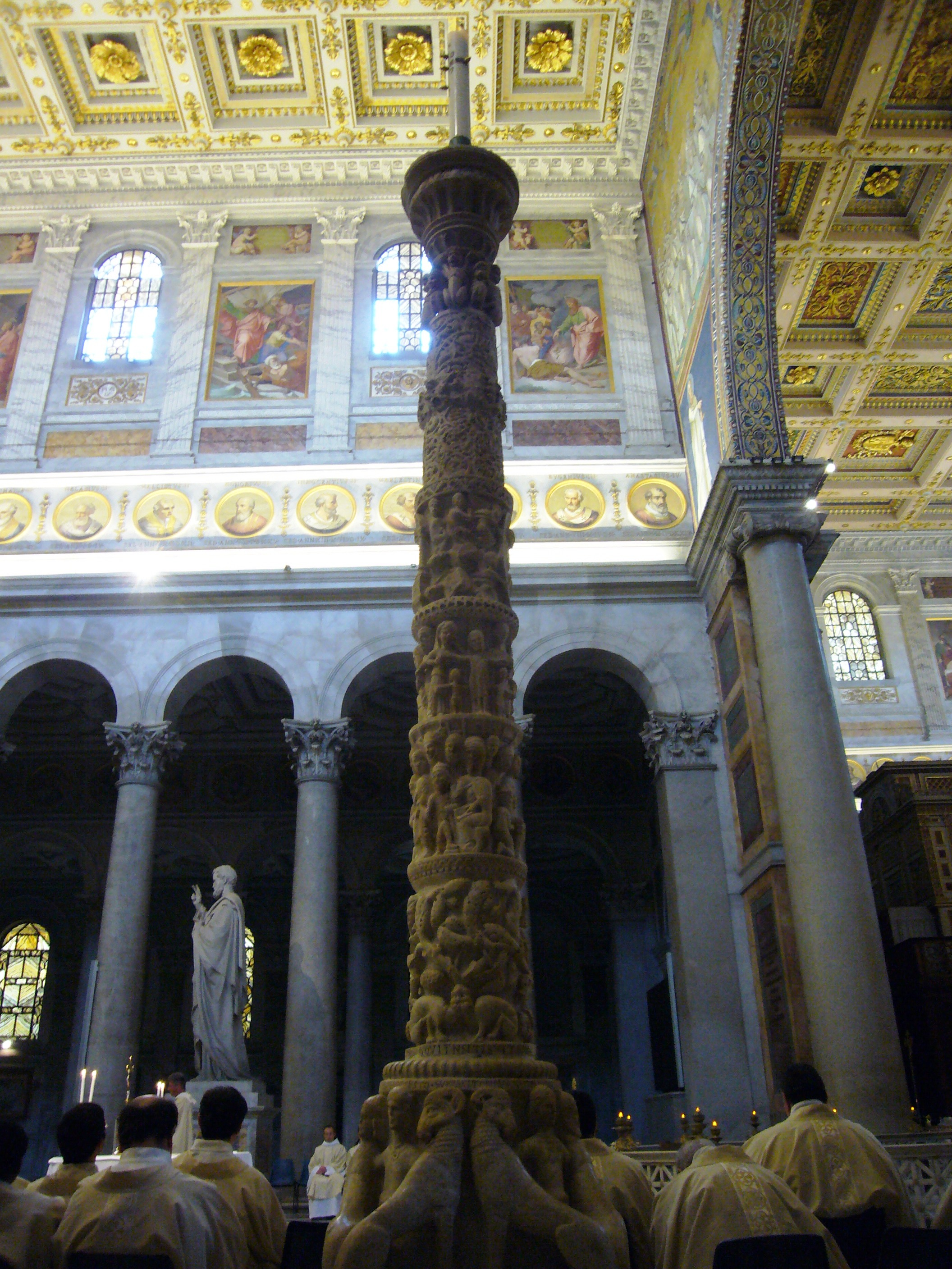 Roma, basilica di san Paolo fuori le mura: candelabro pasquale (Pietro Vassalletto e Nicola d'Angelo)